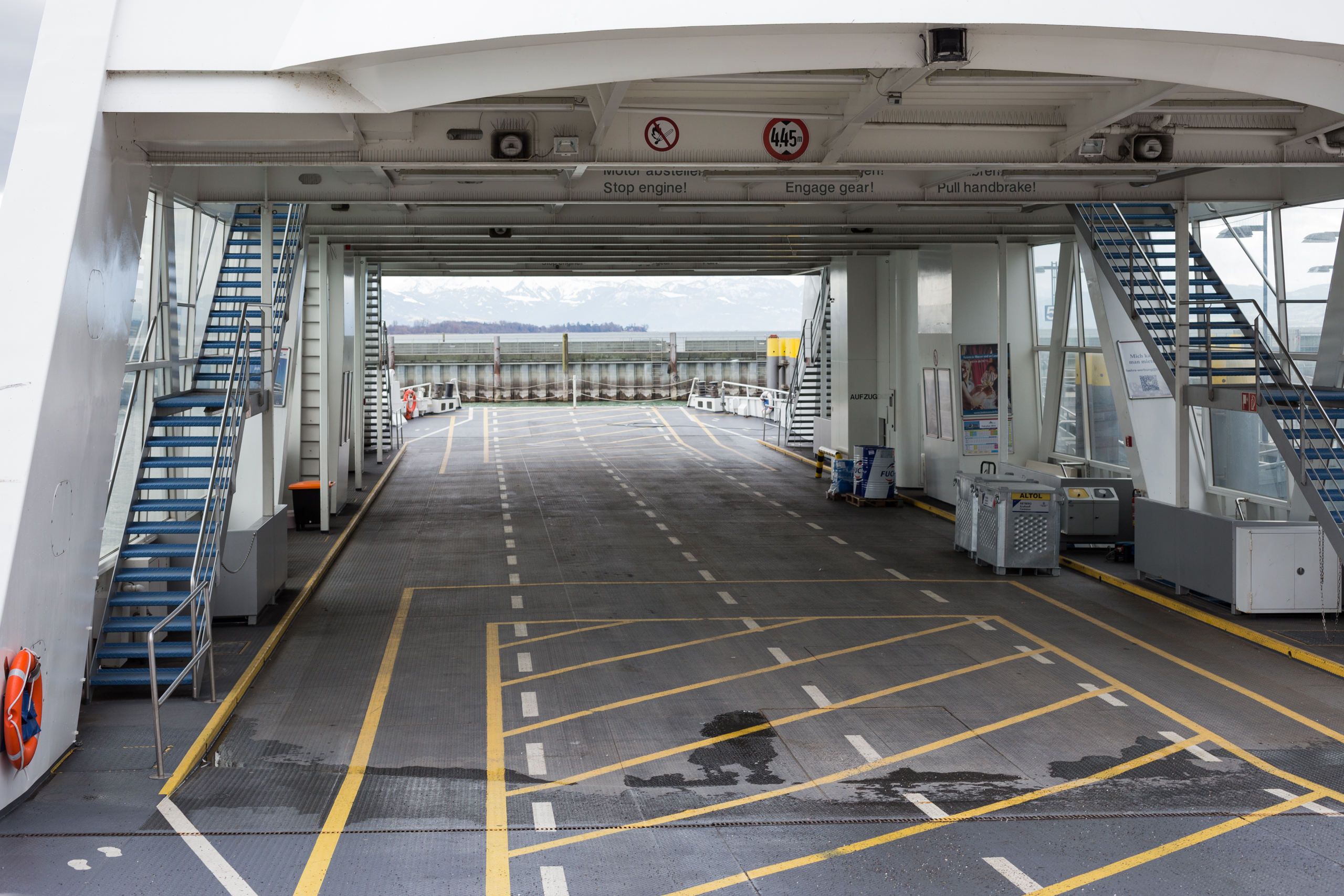 Autodeck der Bodensesefähre MS "Euregia" in Friedrichshafen